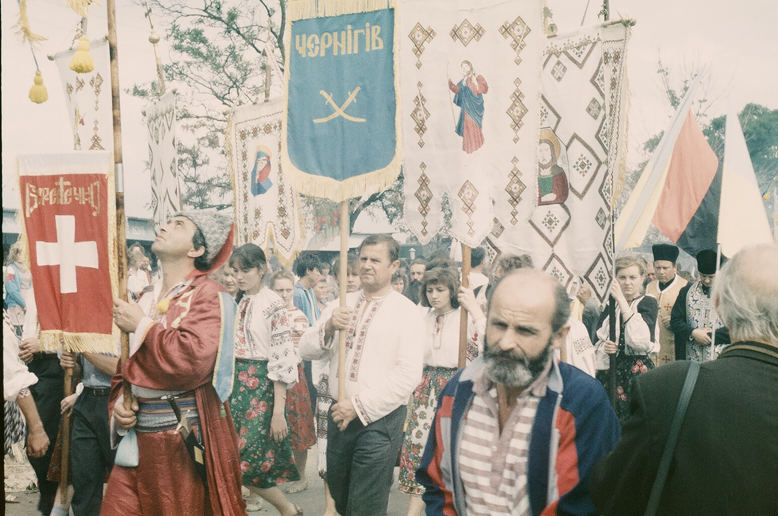 500 років Українському козацтву. 1990.: фото